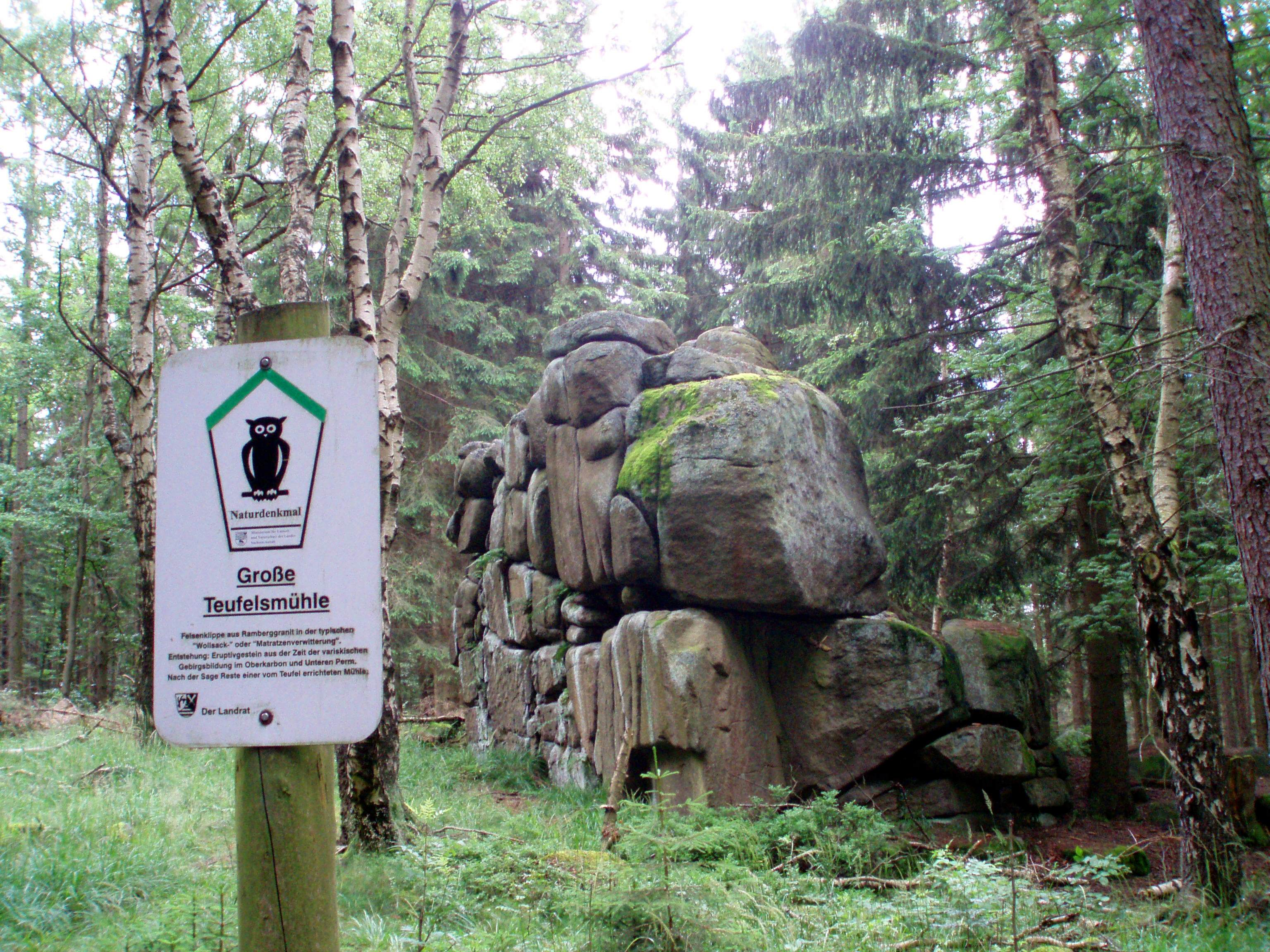 Große Teufelsmühle auf der Viktorshöhe, Gemarkung Gernrode